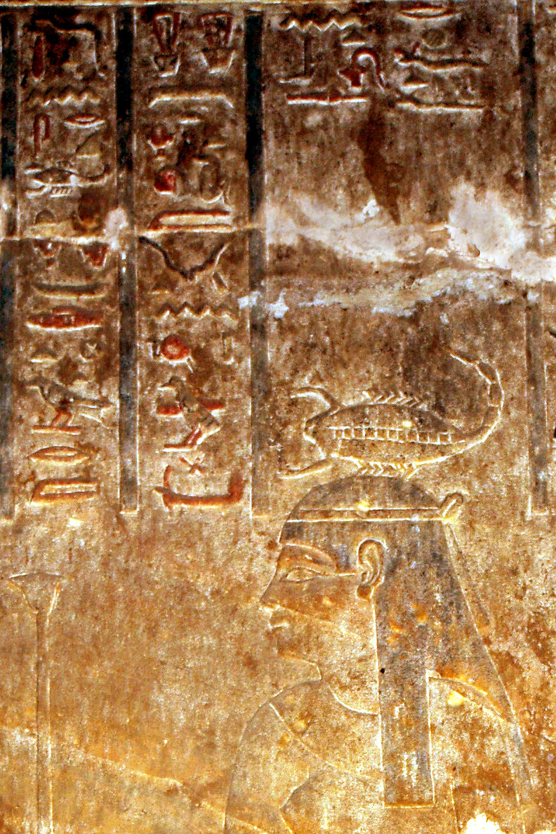 Serket. Edfu Temple.